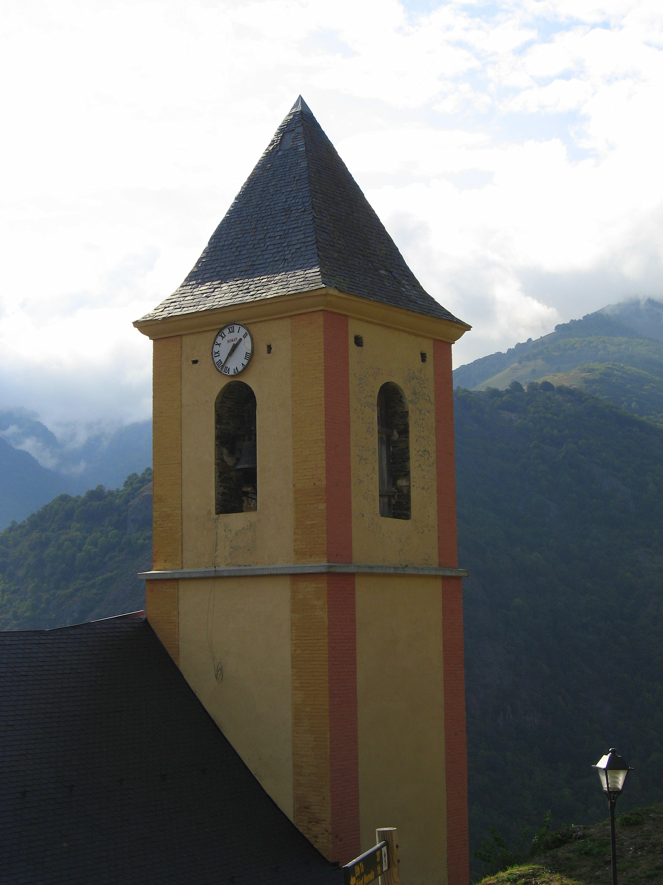 Torre de l'església de Canejan (Baix Aran)